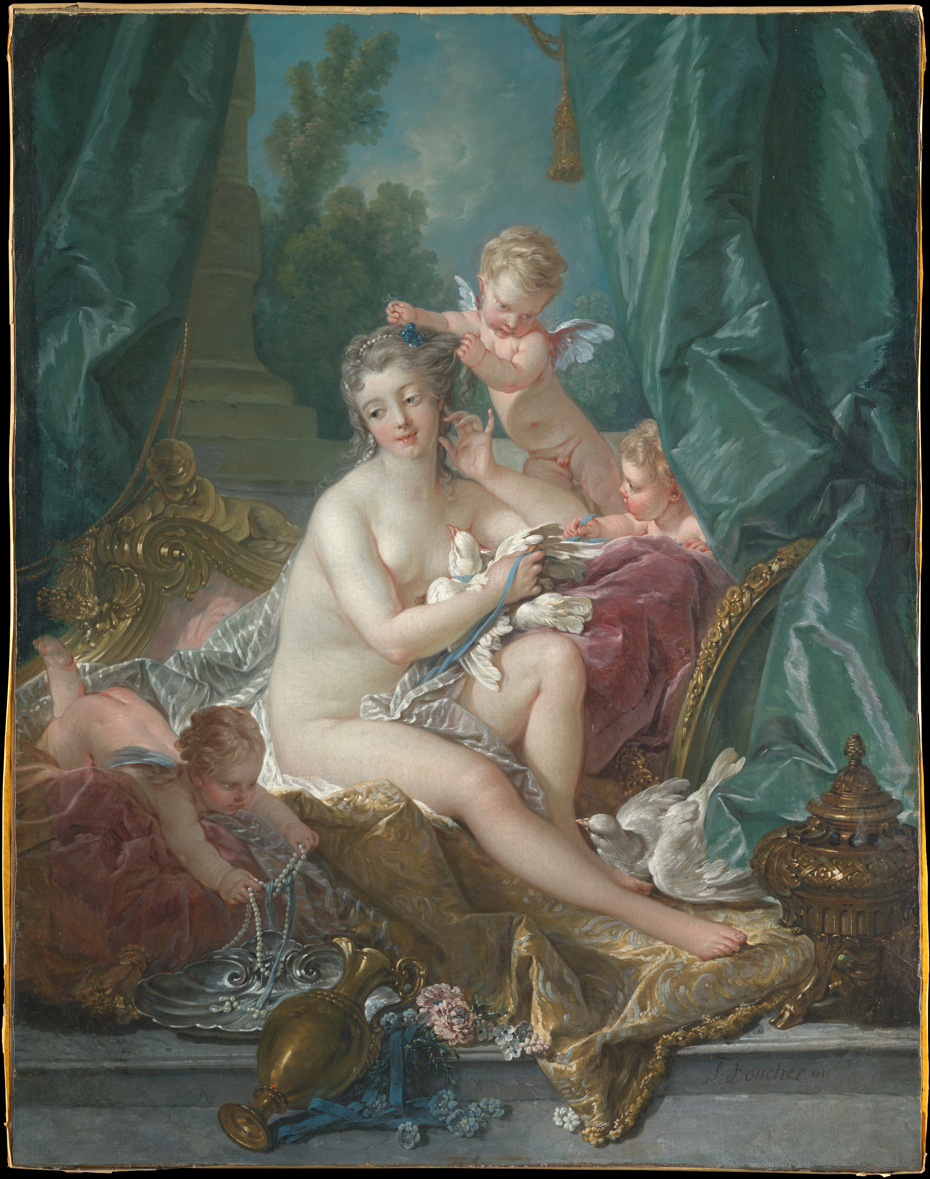 Painting, overdoor; Paintings